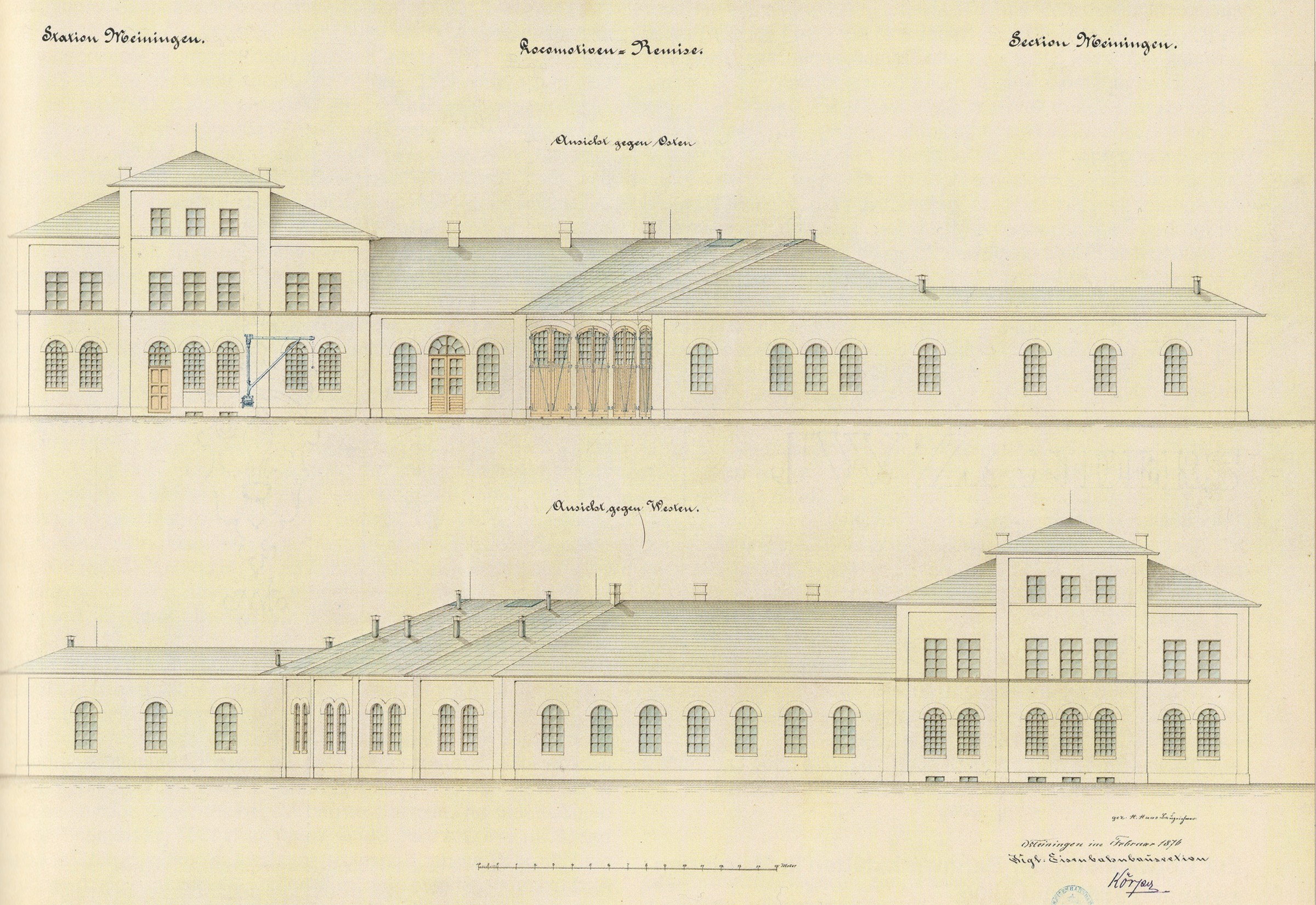 Ansichten der Lokremise des Bayerischen Bahnhofs in Meiningen, gefertigt 1876 von der königlichen Eisenbahnbausektion Bayern.